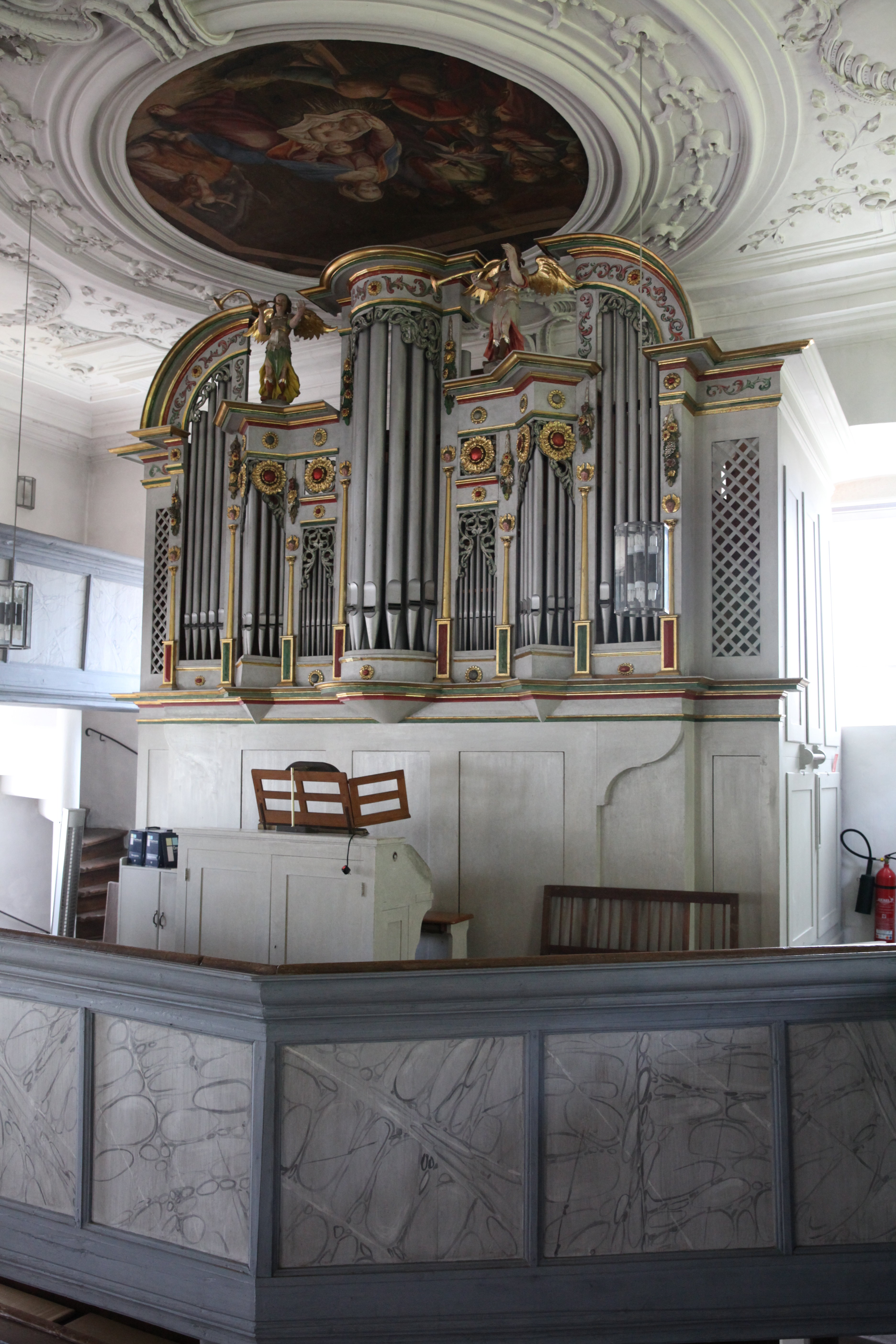 Orgel, Evangelische Matthäuskirche, Gestungshausen